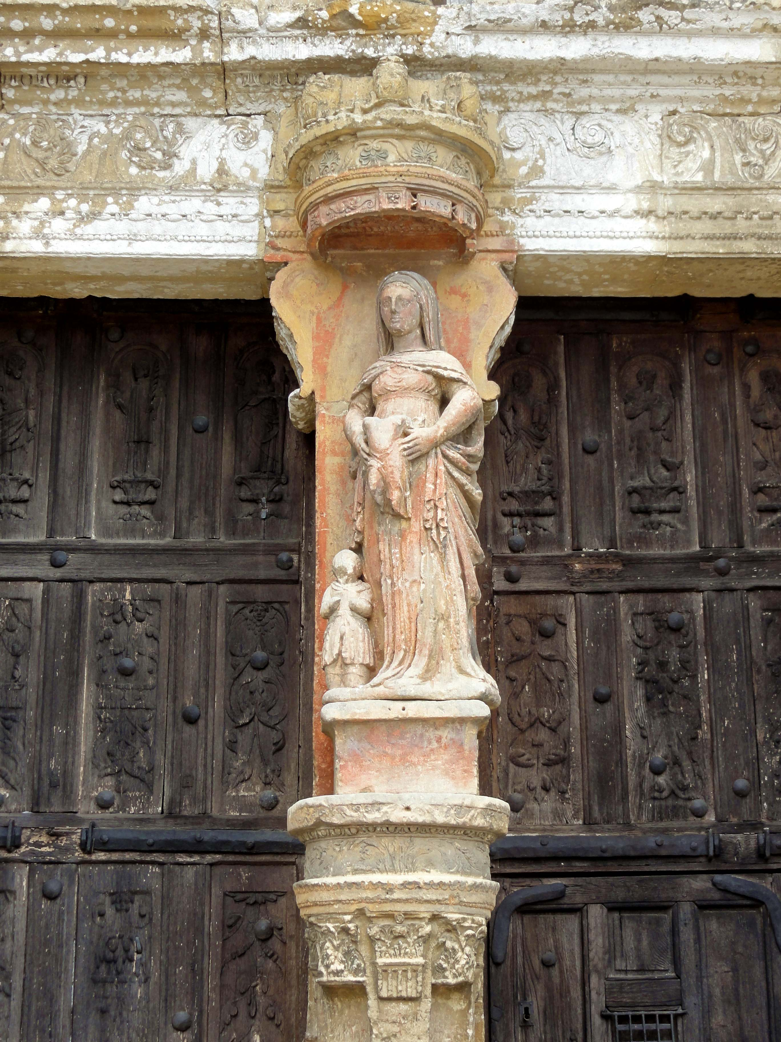 Église Saint-Gervais-et-Saint-Protais de Saint-Gervais (voir titre).